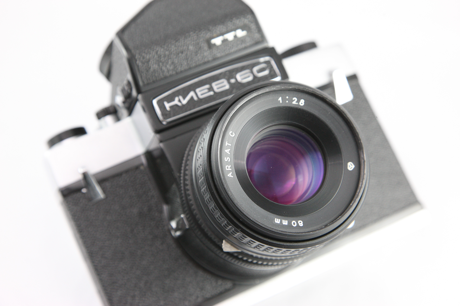 0536 Kiev 6C 80mm Arsat C f2.8 Lens